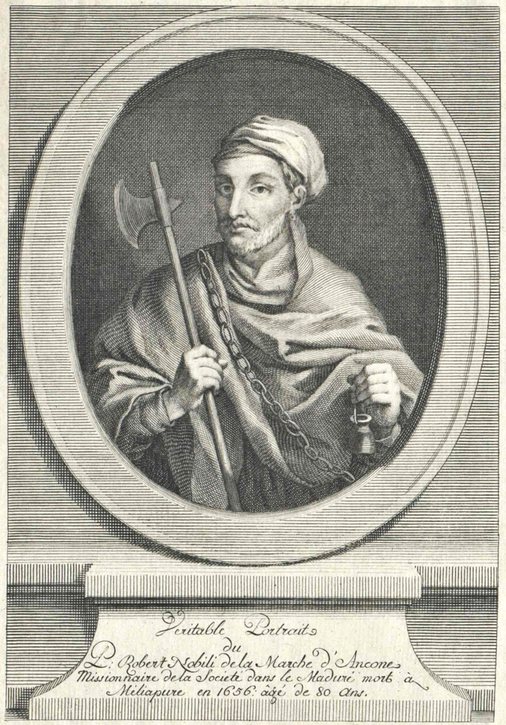 Roberto de Nobili (1577-1656), italienischer Jesuit, Missionar in Indien